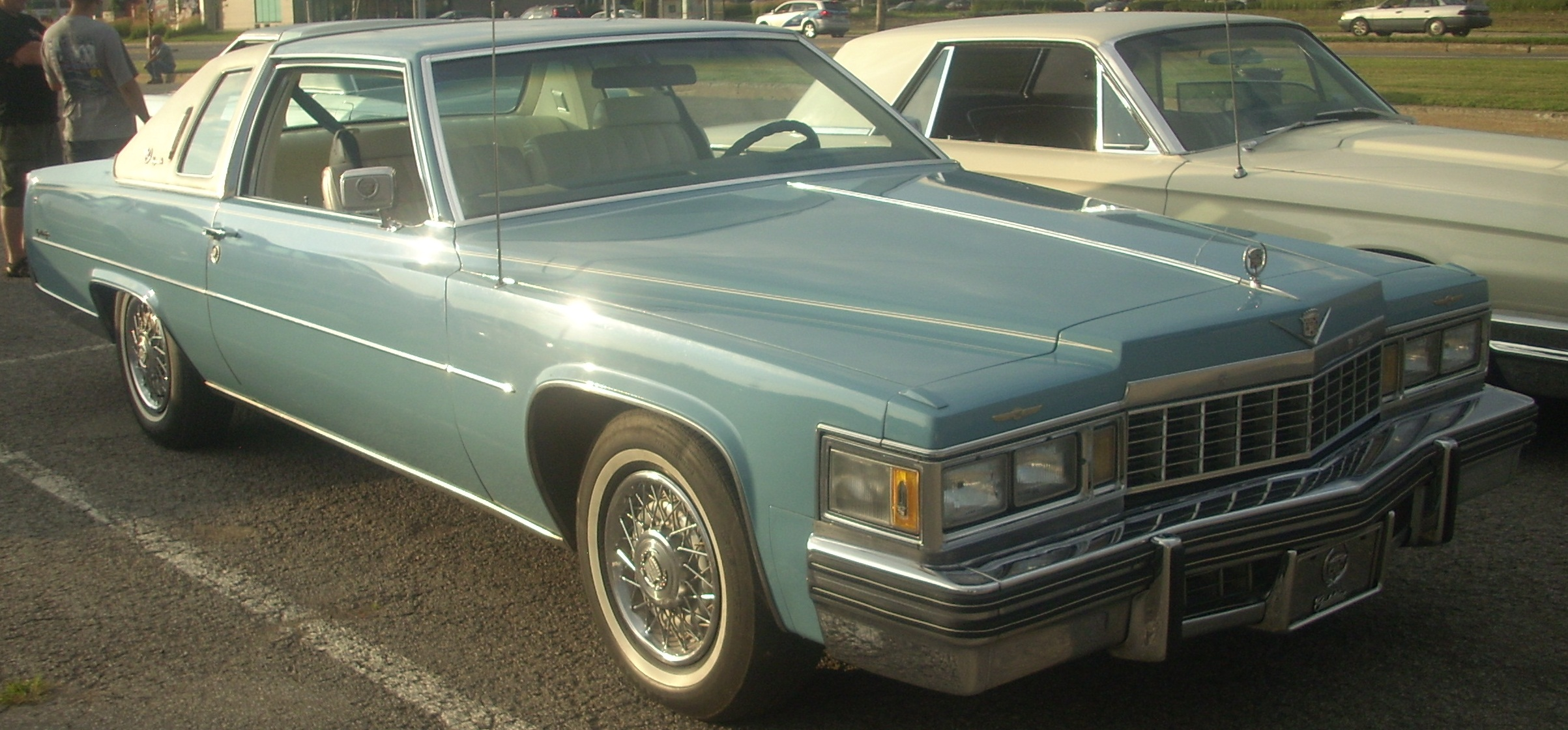 1977 Cadillac Coupe de Ville photographed in Laval, Quebec, Canada at Les chauds vendredis 2010.